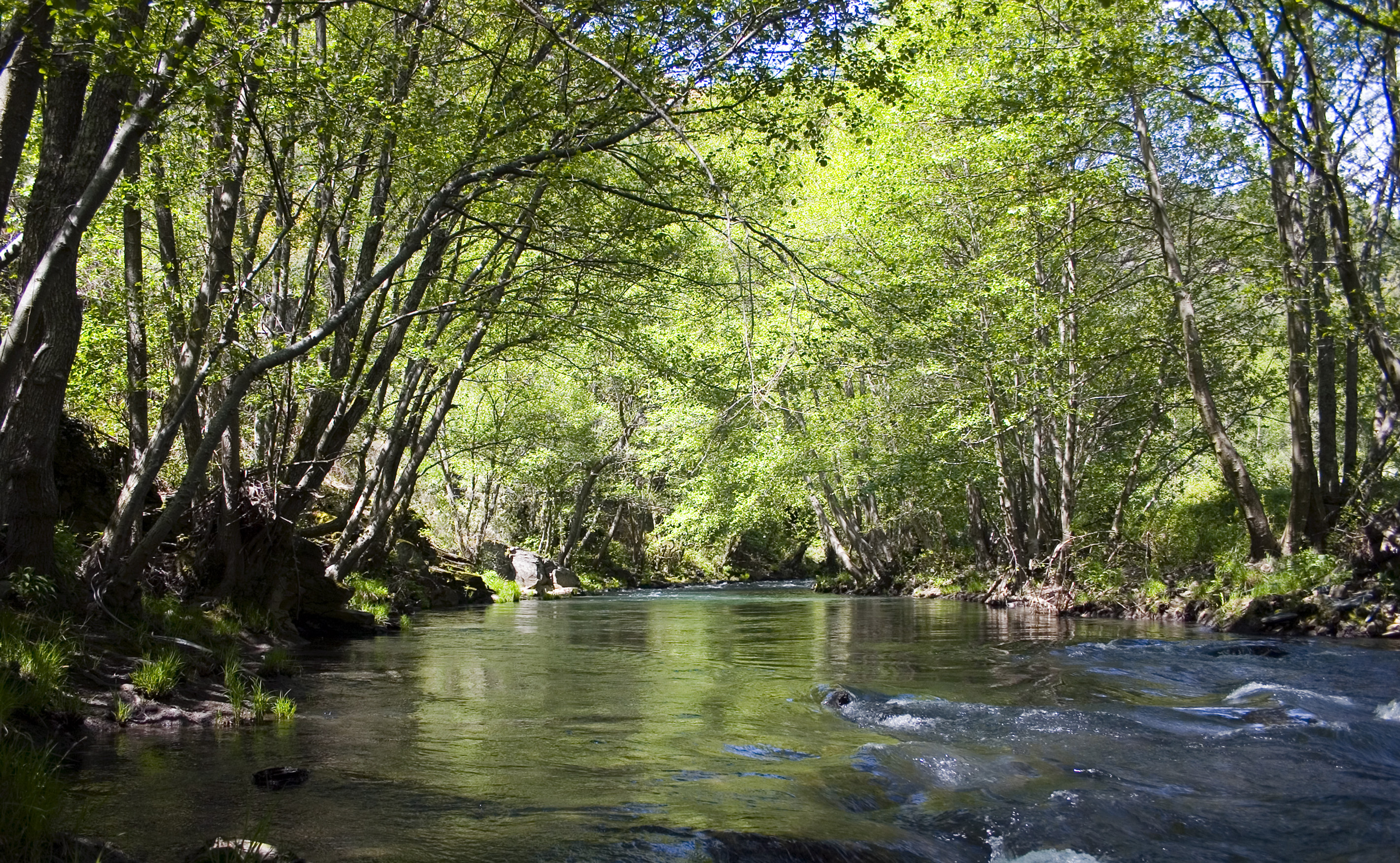 Río Cúa, en su curso medio, entre las poblaciones de Vega de Espinareda y San Vicente (León, España)